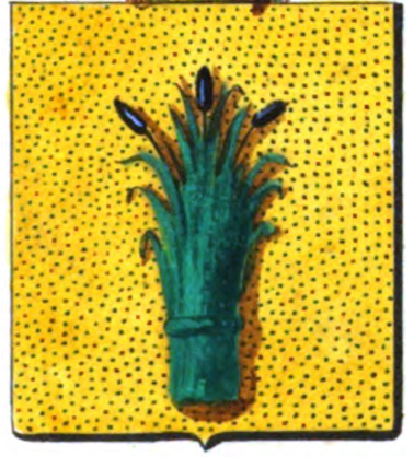 D'or à une gerbe de joncs de sinople liée du même entremêlée de trois roseaux de sable.